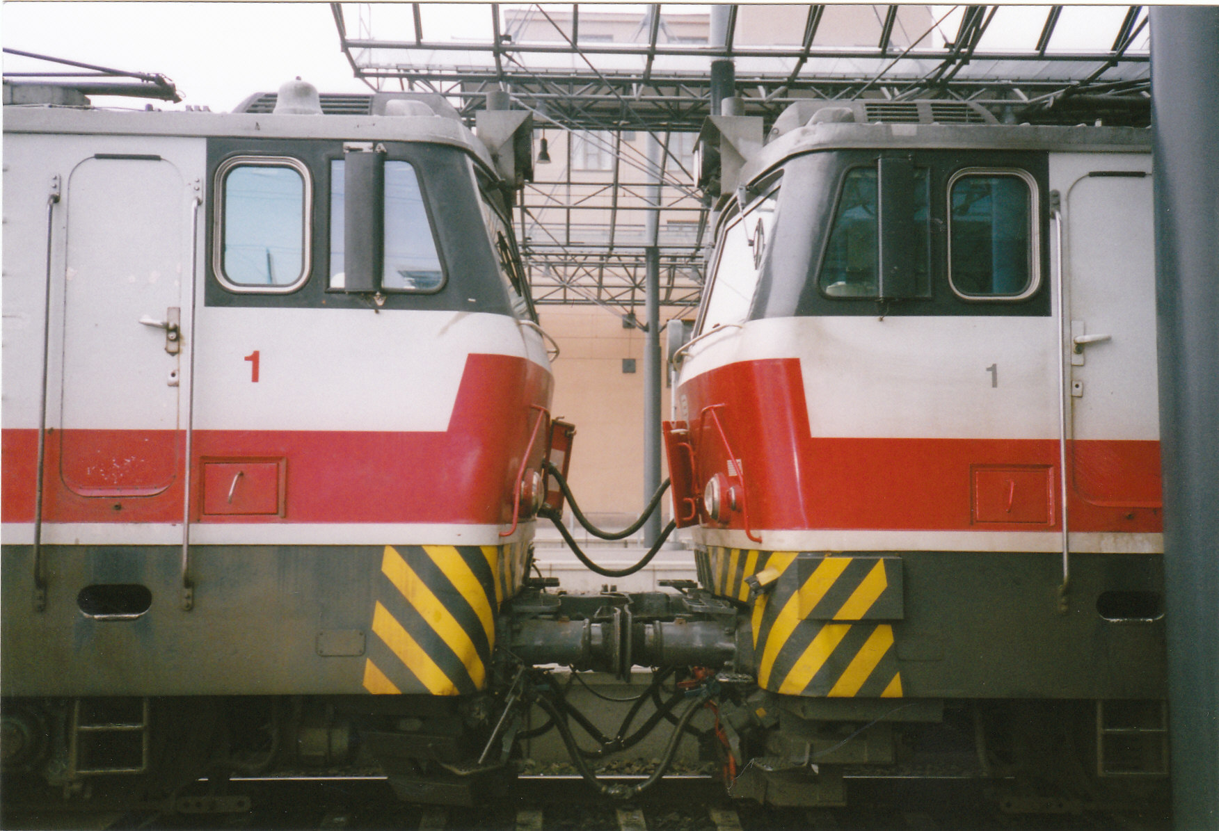 Kahden kaksinajossa olevan Sr1-veturin kytkentä. Kuvattu Helsingin rautatieasemalla.